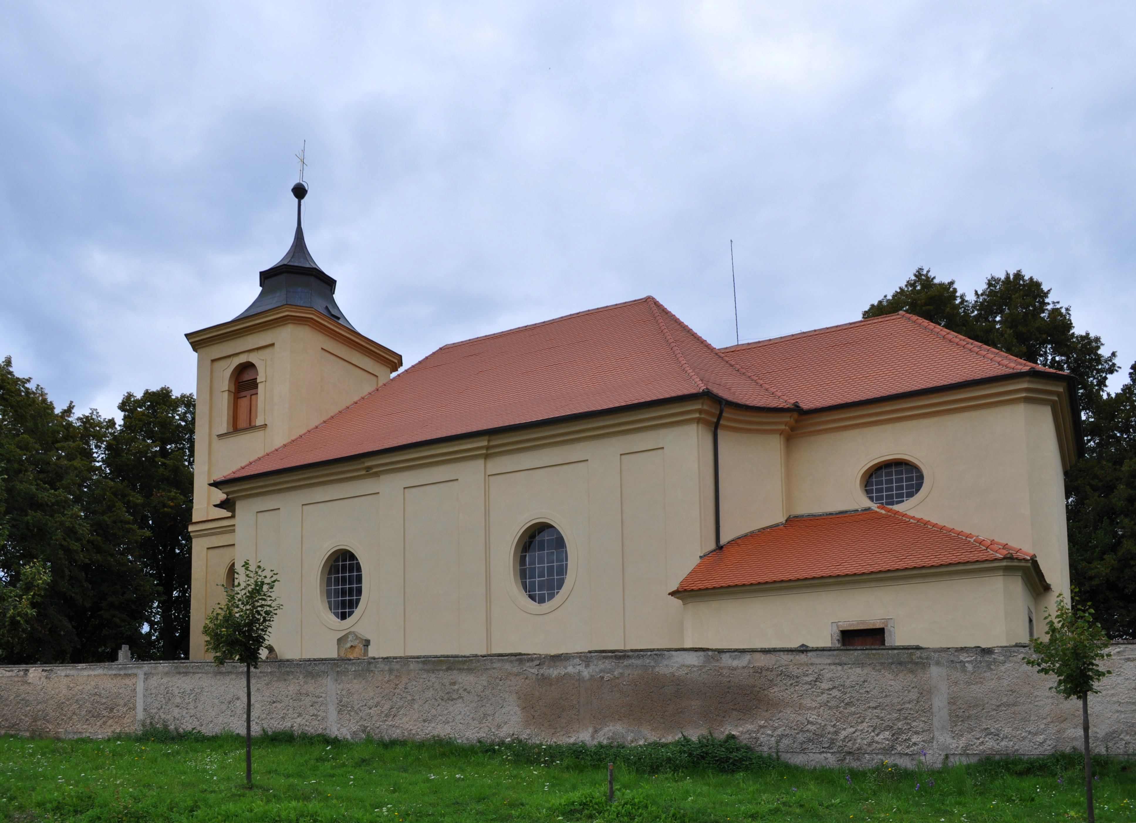 Kostel sv. Markéty, Břežany